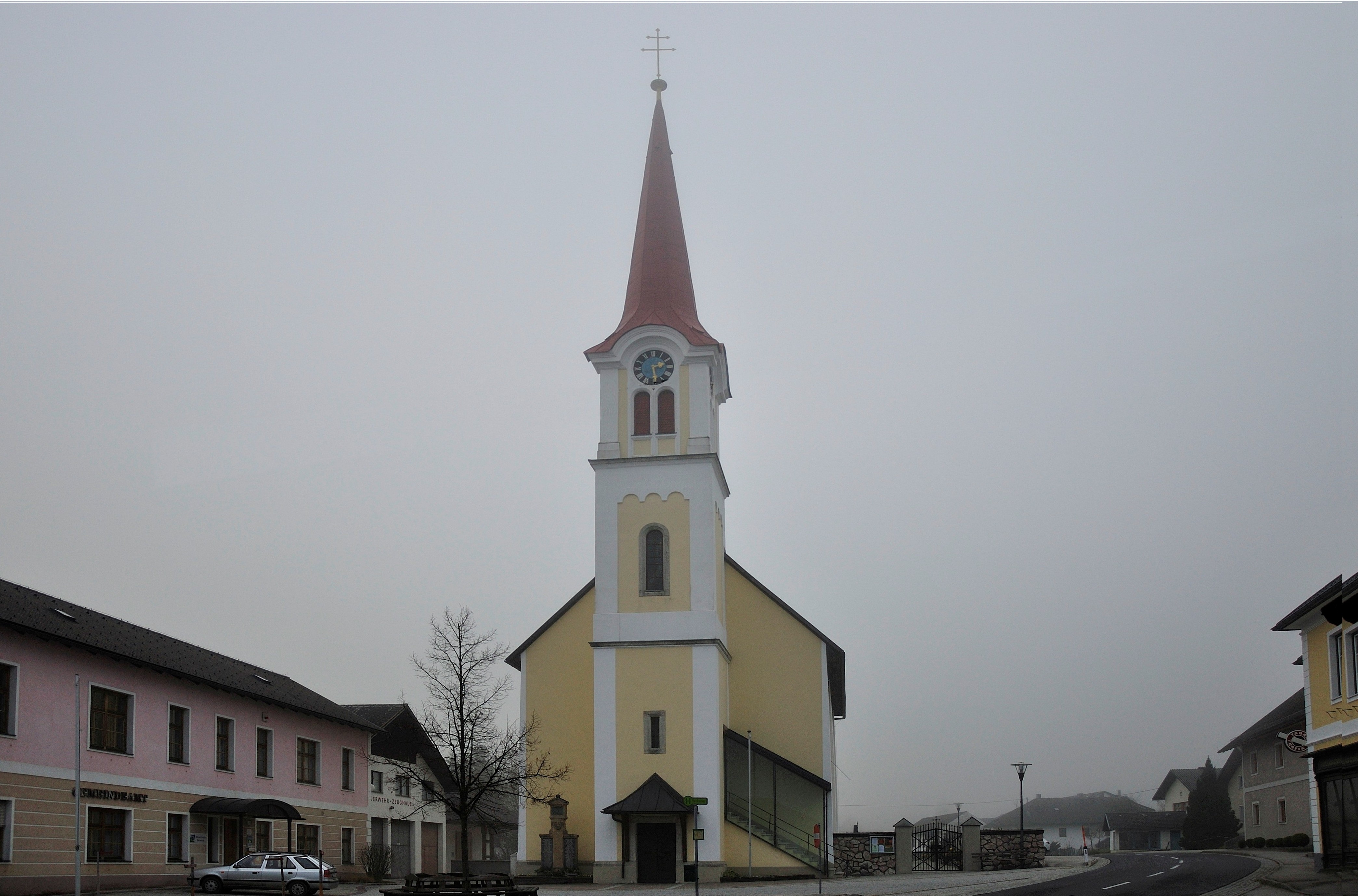 Kath. Pfarrkirche hl. Florian mit Friedhof